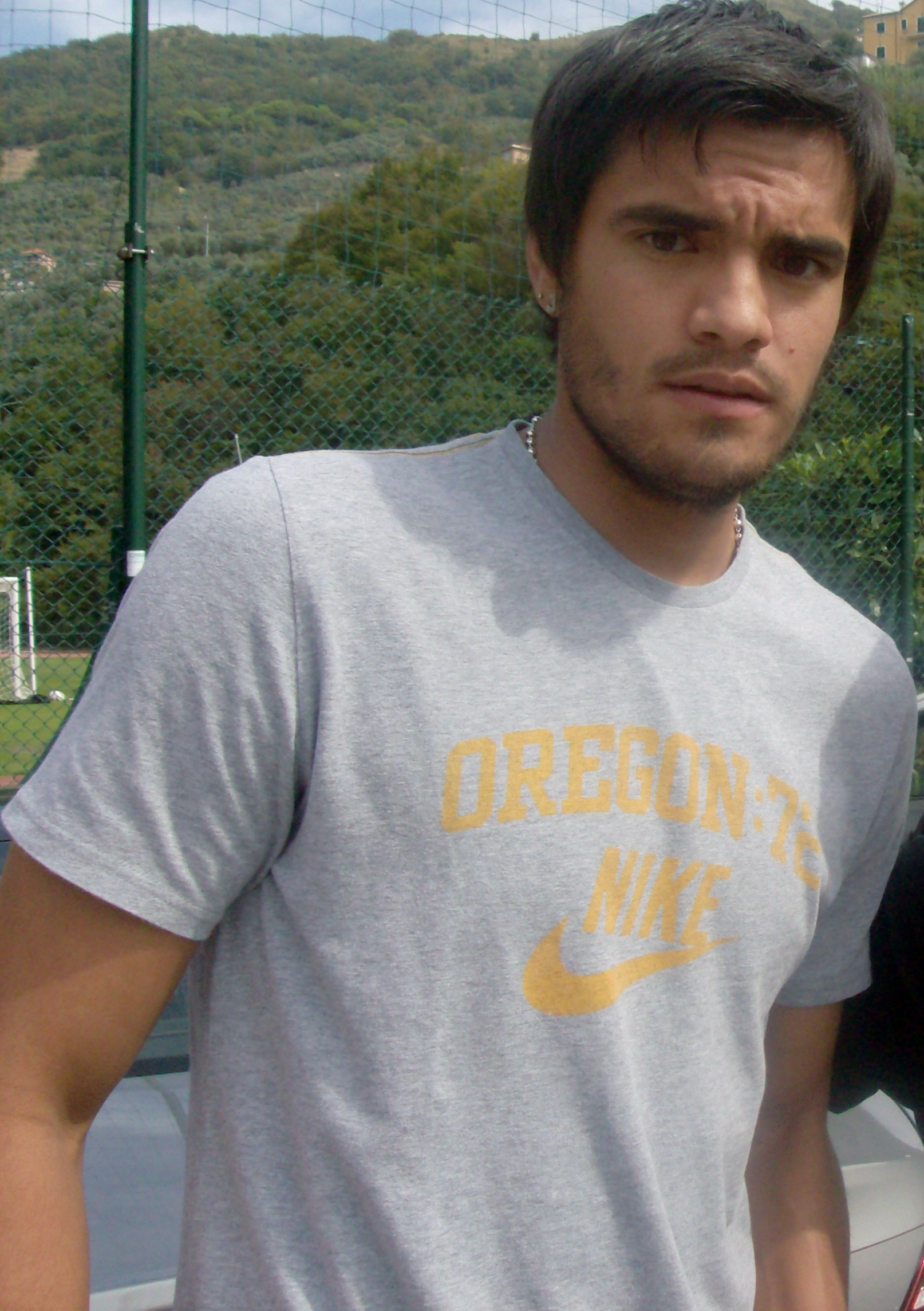 Romero al C.S. Mugnaini ai suoi primi allenamenti